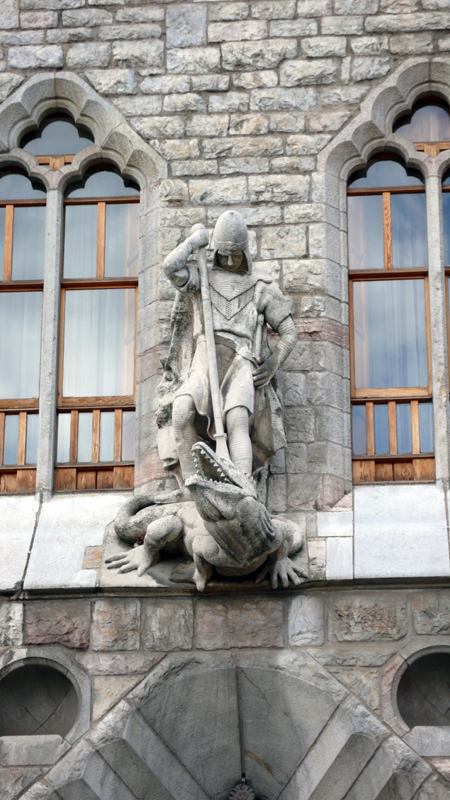 Detalle de la Casa Botines en León. San Jorge y el dragón, de Llorenç Matamala.